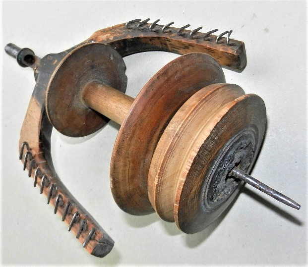 Spindeln mit Zubehör fertigten Spillenmacher aus Holz